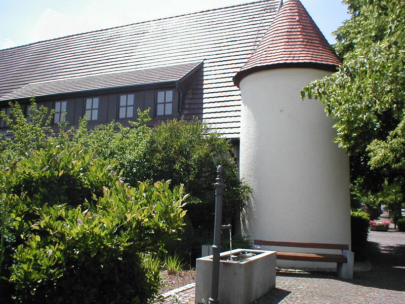 Wehrturm aus dem 14. Jhd., beim Wasserschloss in Bad Rappenau